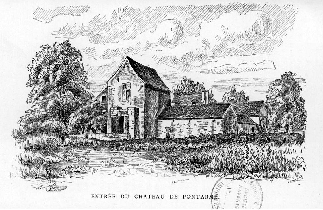 La porte fortifiée et la façade occidentale du châtau vers 1894, alors qu'il sert de ferme.